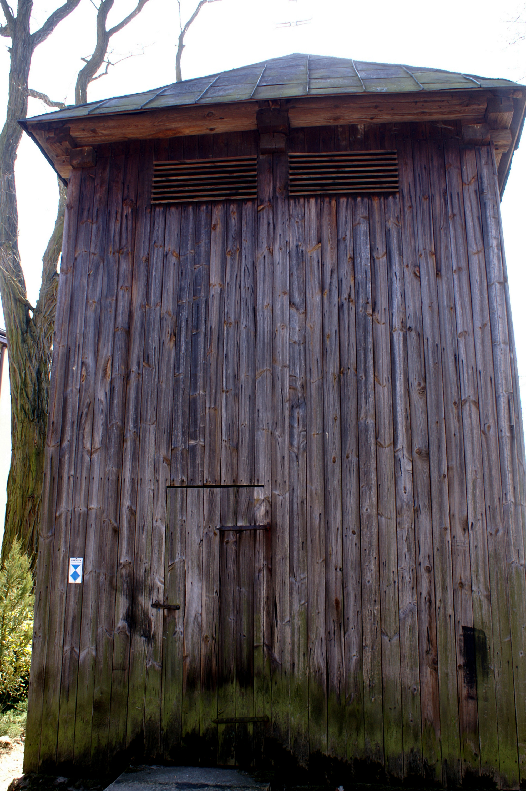 Wygiełzów (powiat bełchatowski) dzwonnica, drewniana 07.1967.